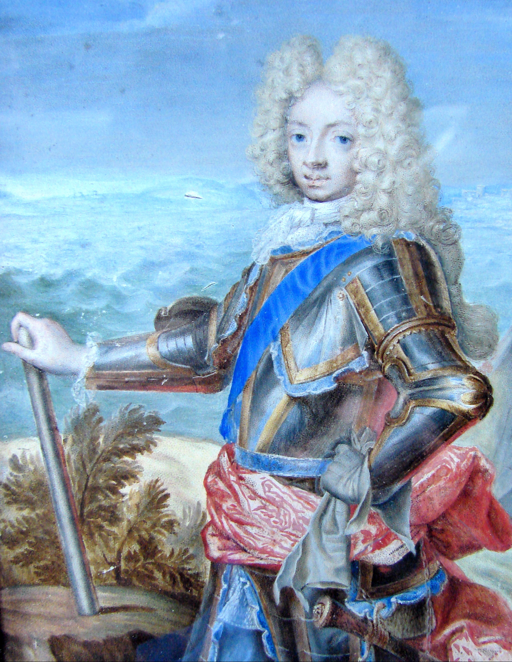 Prins Carl af Danmark og Norge (1680 — 1729), Georg Saleman, kopi efter Hyacinthe Rigaud, Rosenborg Slot, København